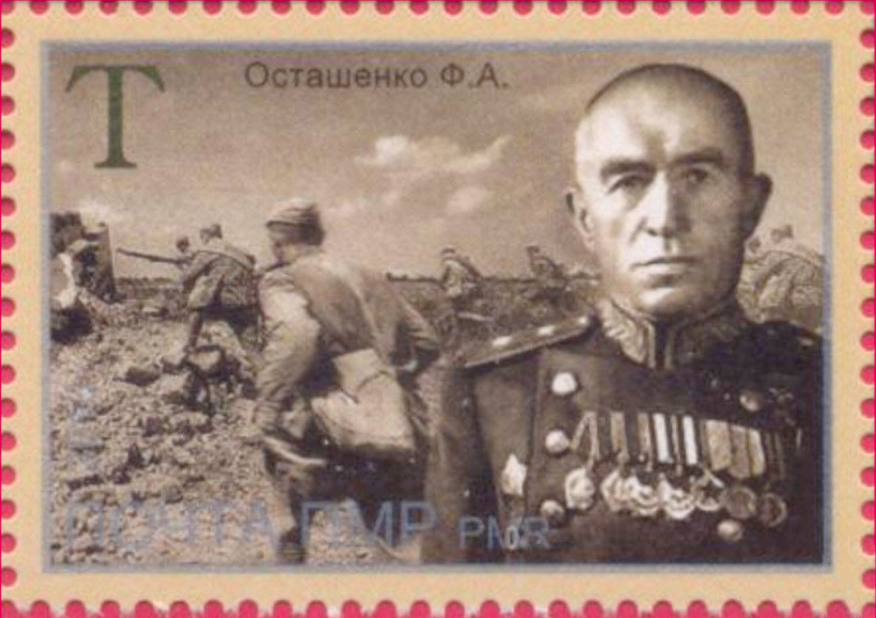 Fyodor Ostashenko